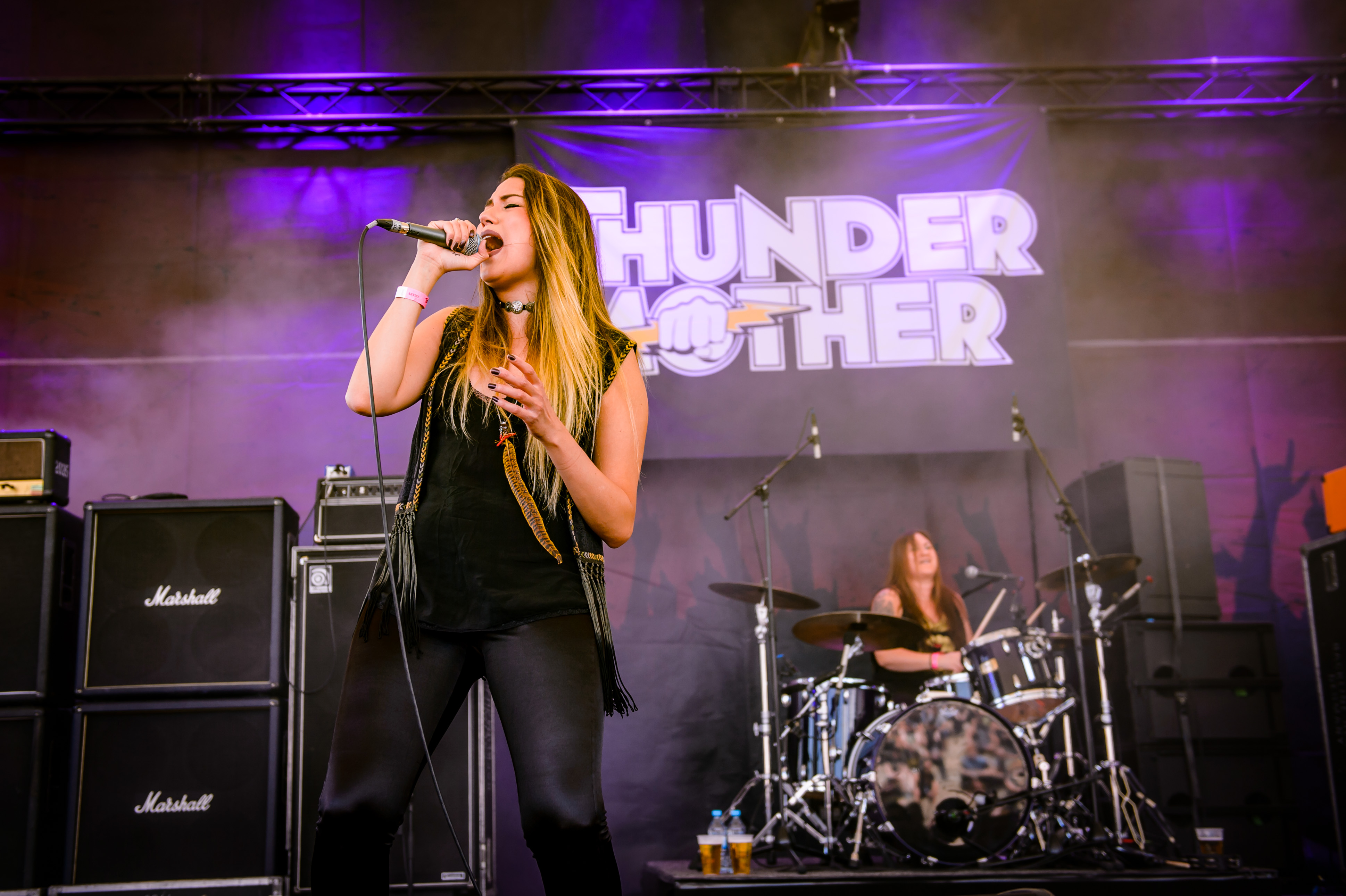 'Rock Hard Festival 2018; Amphitheater Gelsenkirchen': 'Thundermother'